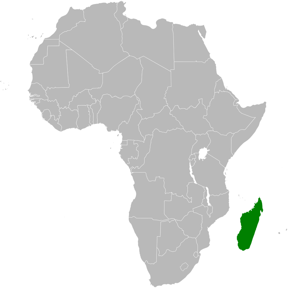 Mirafra hova distribution map; using BlankMap-Africa.svg, based on